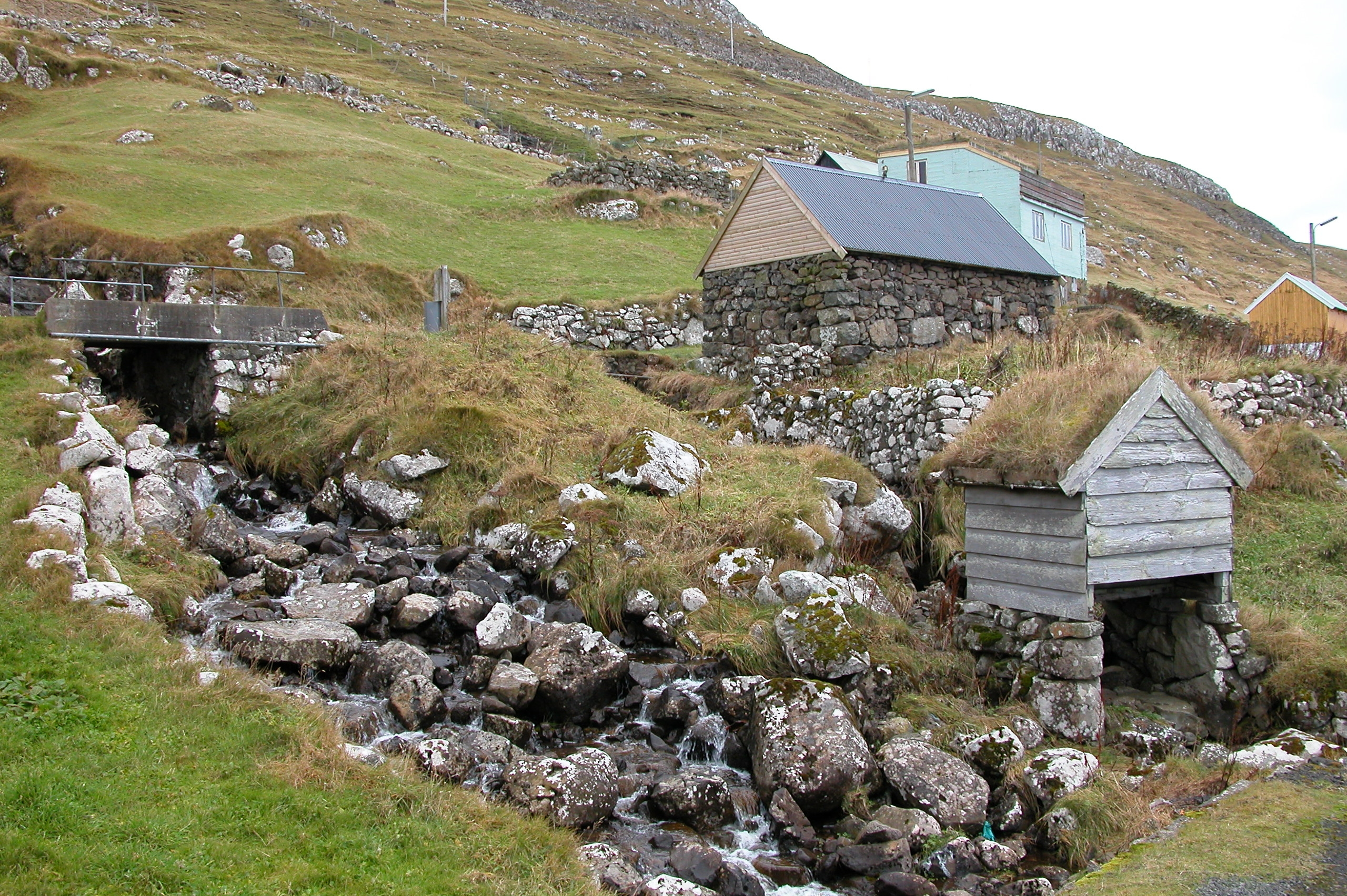 Skarvanes on Sandoy, Faroe Islands